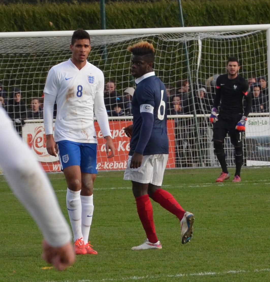 Photographie prise lors du match opposant la France à l'Angleterre pour les qualifications du championnat d'Europe de football des moins de 19 ans 2015 au stade Louis-Villemer de Saint-Lô le 31 mars 2015. Ici, Ruben Loftus-Cheek, Olivier Kemen et Florian Escales en arrière-plan.